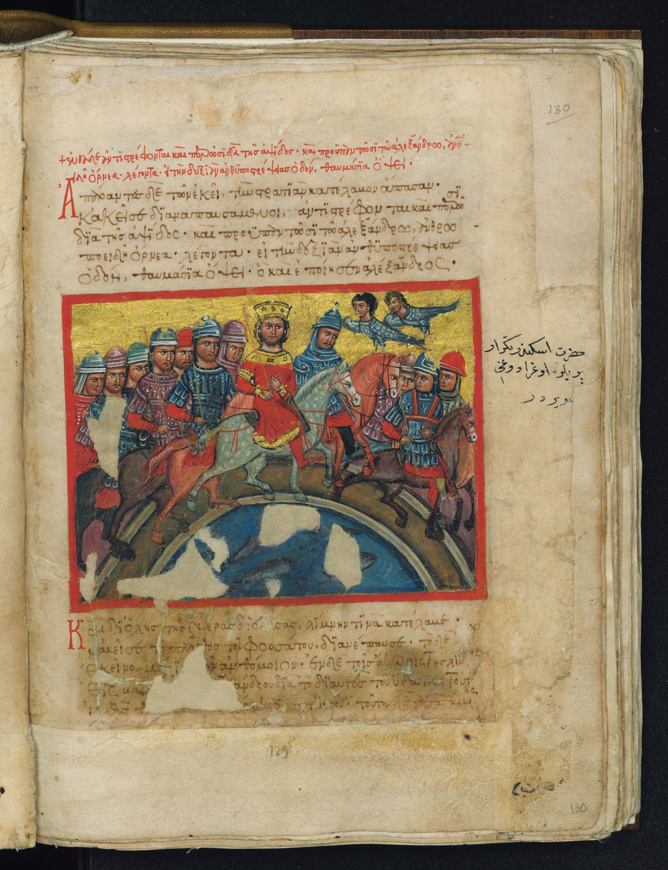 Φυλλάδα του Μεγαλέξανδρου, σελίδα 129 από σωζόμενο αντίτυπο